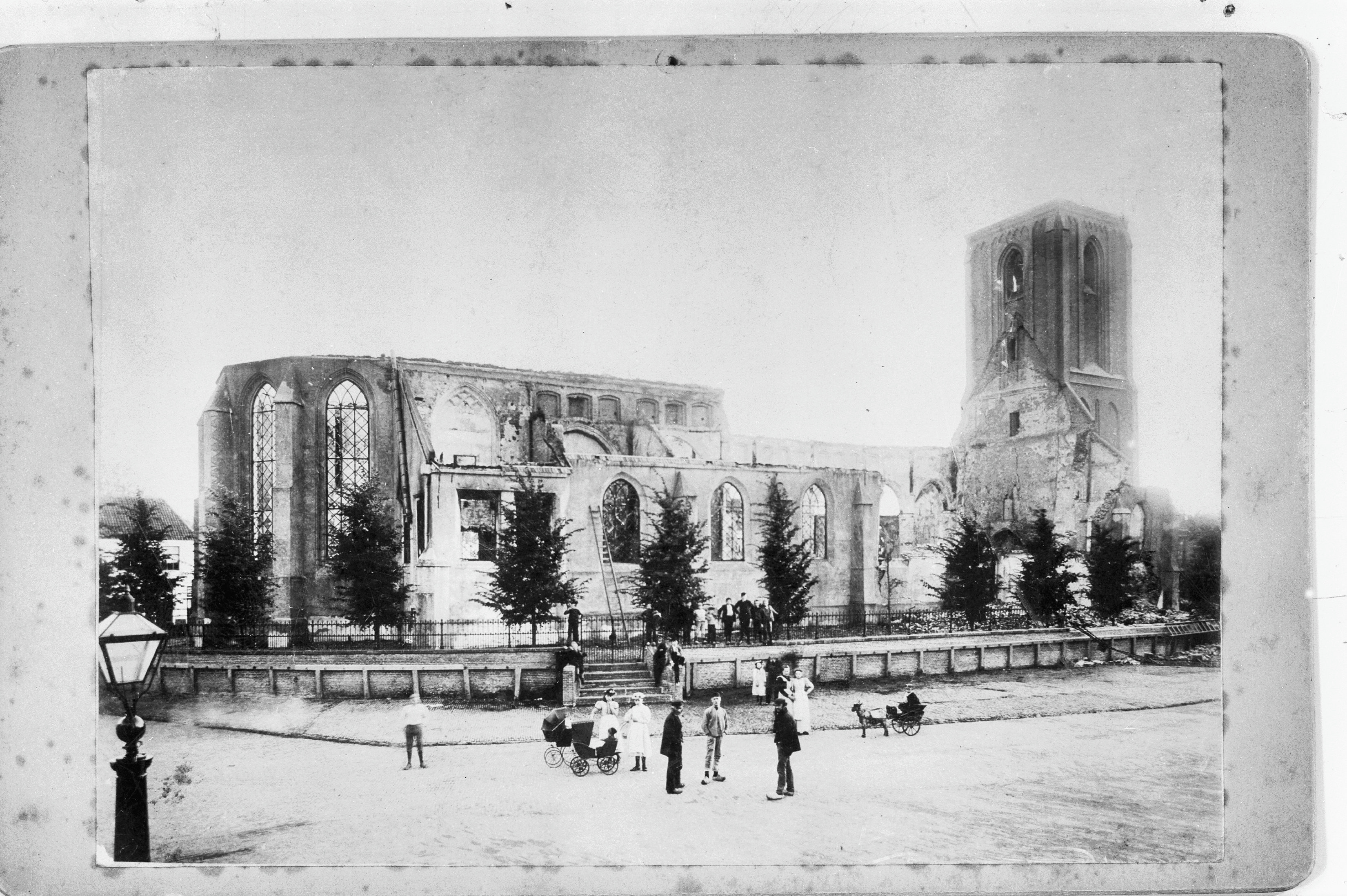 Oude Nederlands Hervormde Kerk: exterieur aanzicht